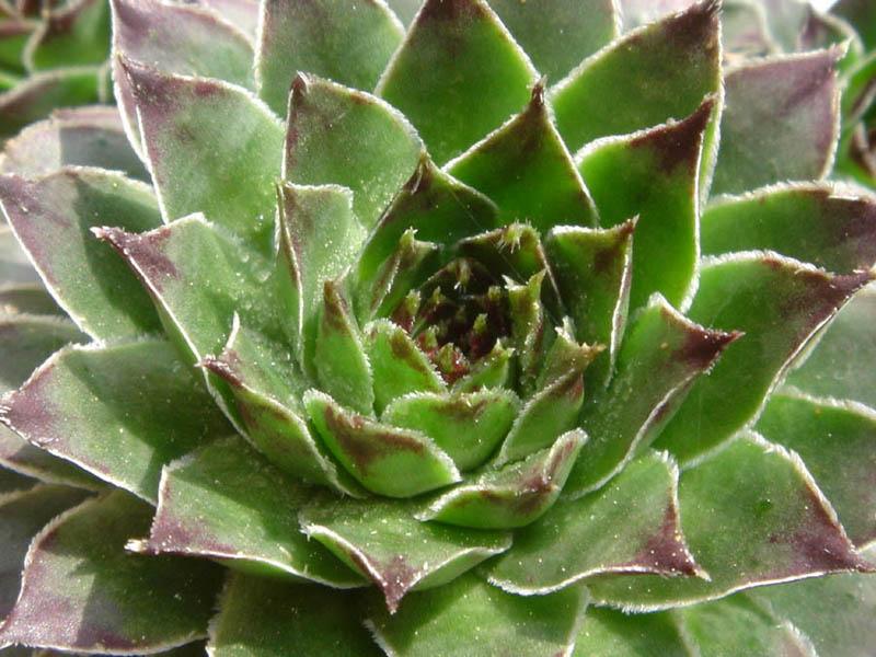 Sempervivum tectorum